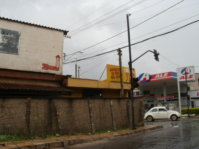 Vista do Posto de Gasolina Ale, em Santa Cruz de Minas, Minas Gerais, Brasil.